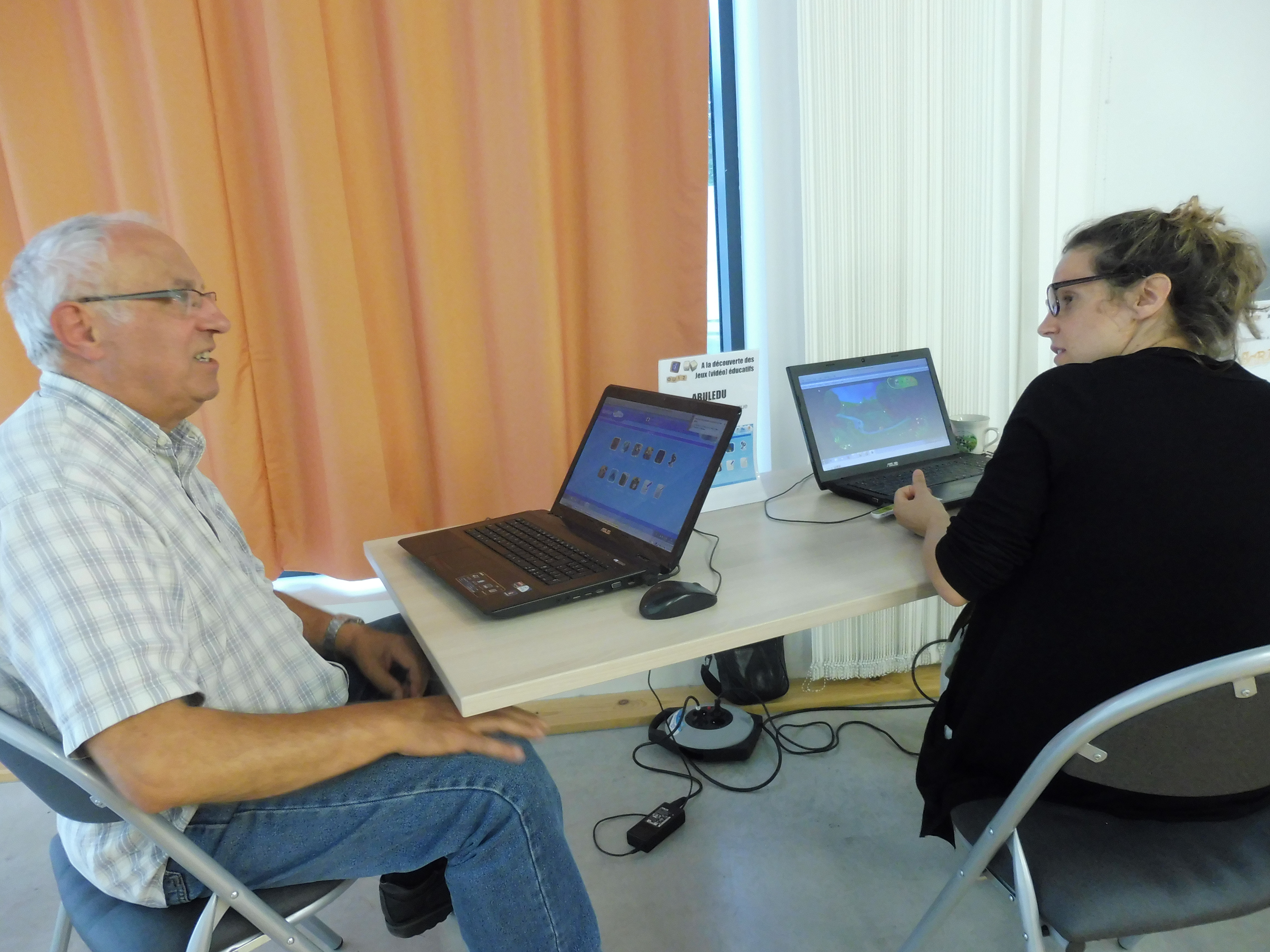 La suite logicielle AbulÉdu à Podensac-33 le samedi 1er juillet 2017 ː présentation par le président du club informatique de Pujols-sur-Ciron.